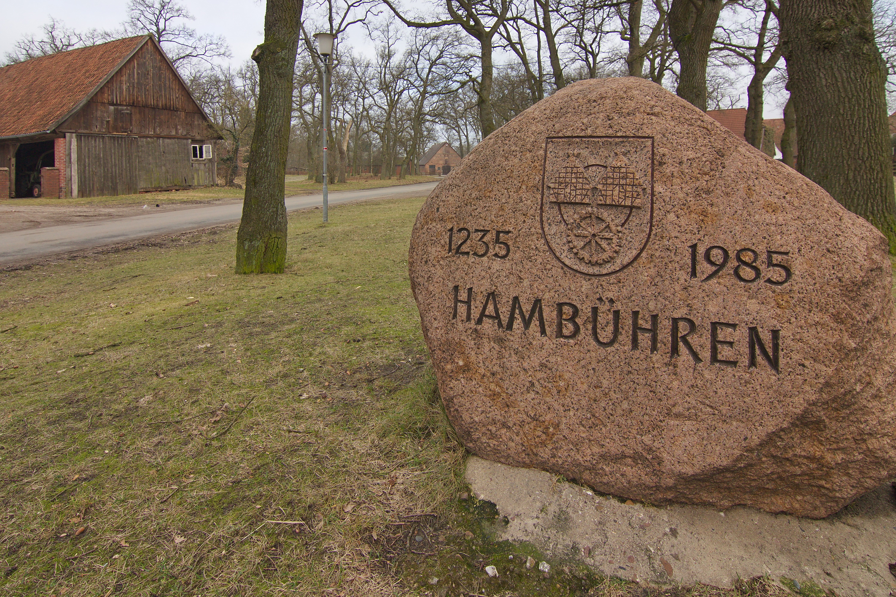 Gedenkstein in Hambühren, Niedersachsen, Deutschland.